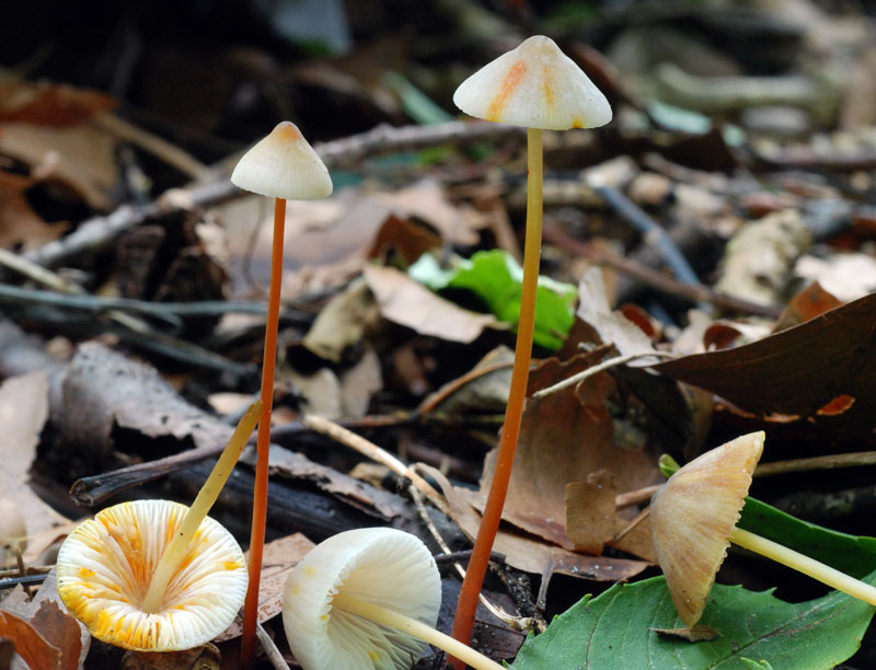 Sopparten safranhette (Mycena crocata)